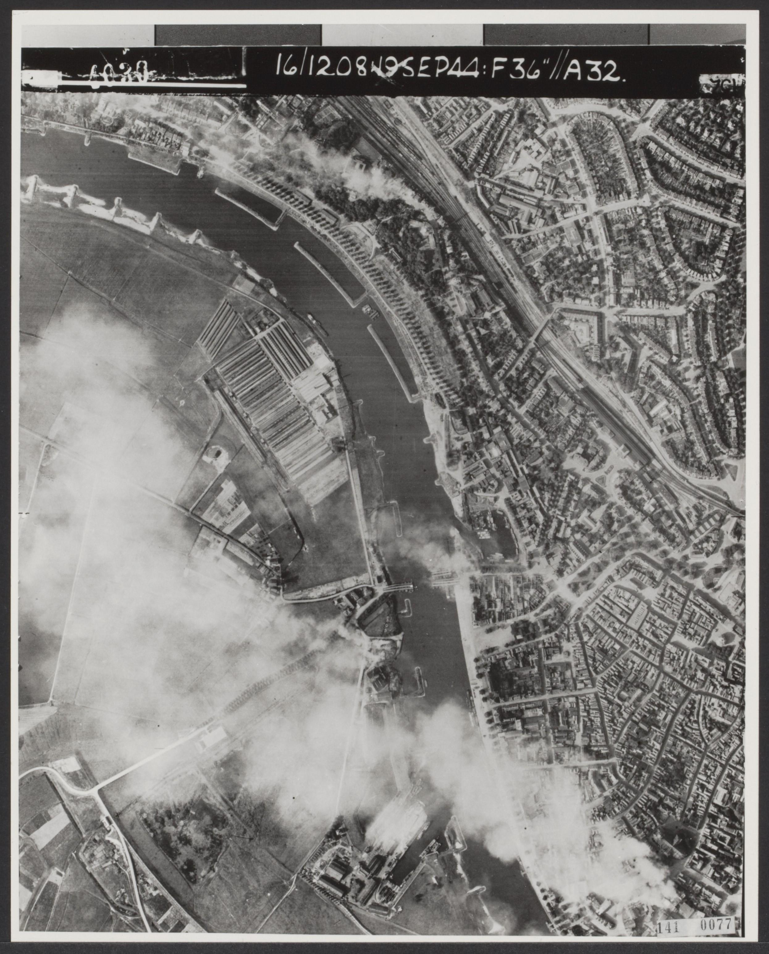 Luchtopname [Operatie Market Garden] Gevechten op Onderlangs-Bovenover in Arnhem. Om de ingesloten parachutisten bij de brug in Arnhem beginnen vier Britse bataljons in de vroege ochtend van 19 september een aanval via de wegen Onderlangs en Bovenover. Deze aanval mislukt. Op de luchtfoto die omstreeks het middaguur is gemaakt, zie we aan de rookwolken waar gevochten wordt; op Bovenover, oostelijk van de Oude Haven bij de Schipbrug en in de omgeving van de verkeersbrug. De brand in het Paleis van Justitie aan de Markt veroorzaakt zo'n reusachtige rookwolk dat een deel van de binnenstad en het land aan de overzijde van de rivier eronder schuil gaan